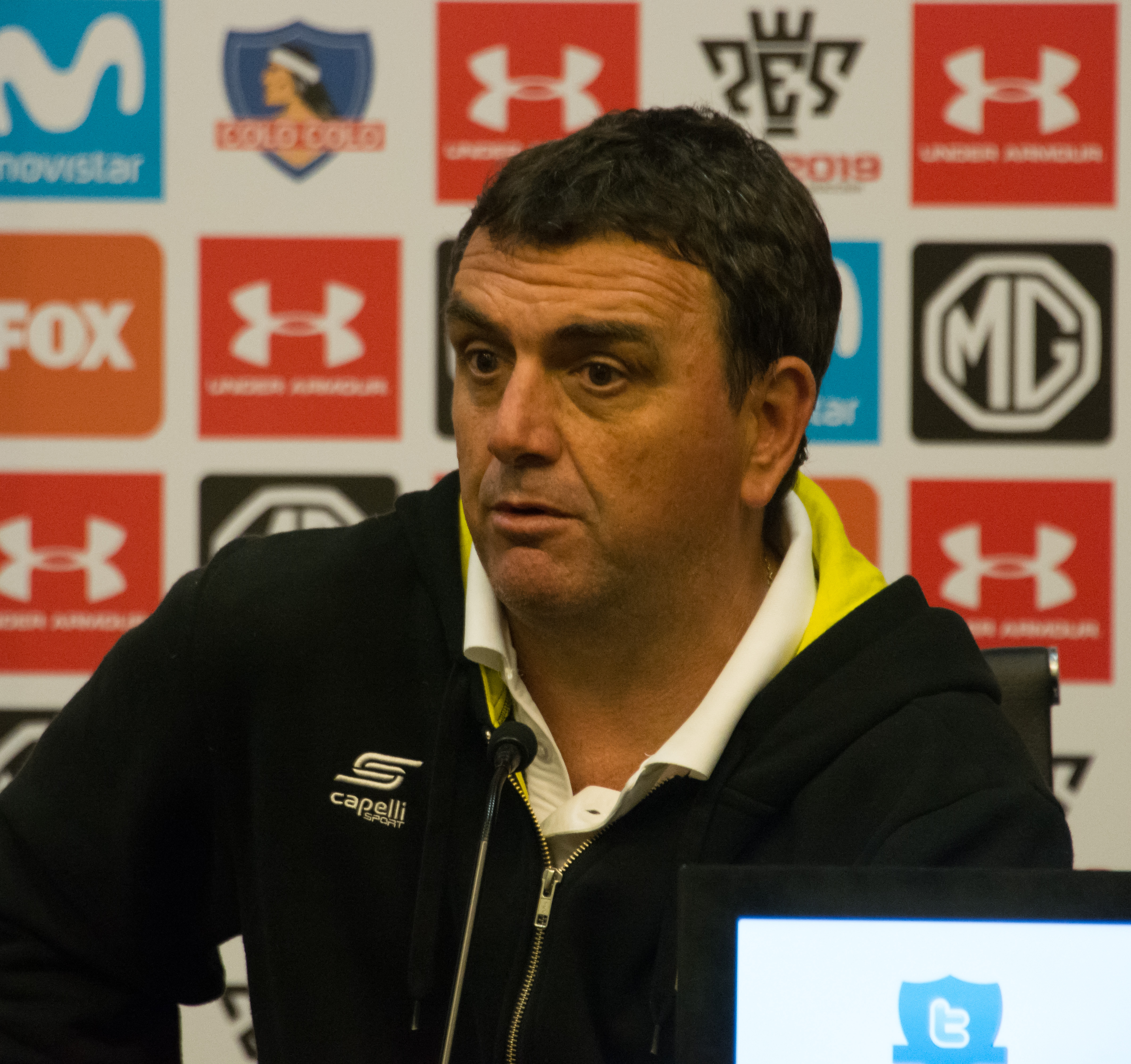 Diego Osella, Colo-Colo v San Luis, Estadio Monumental, Macul, Santiago, Chile.